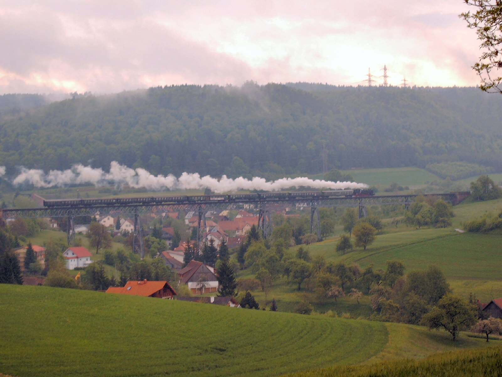 Wutachtalbahn: Zug auf der Talbrücke Epfenhofen